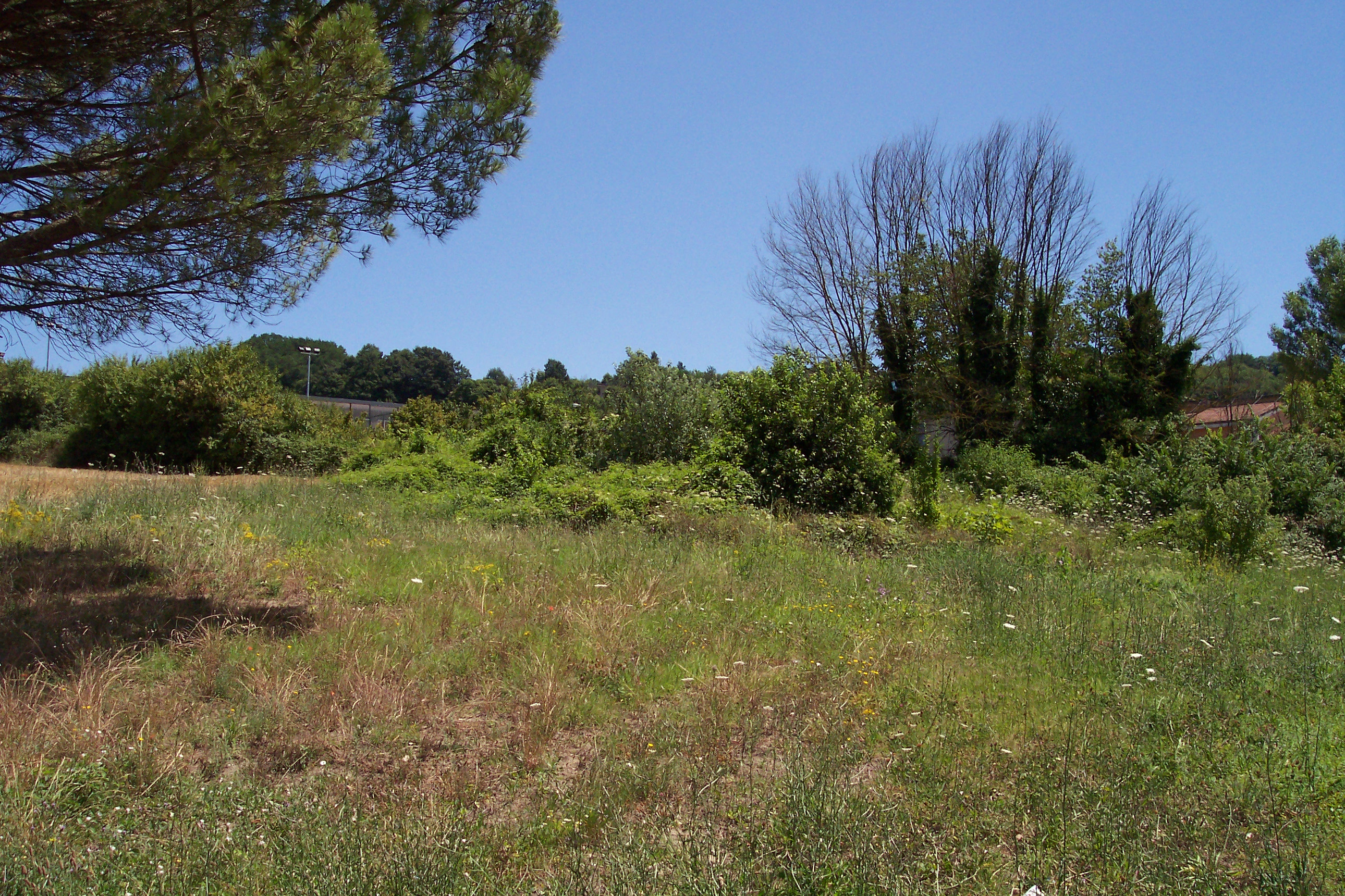 Le condizioni attuali della Basilica di San Giovanni di Pratola